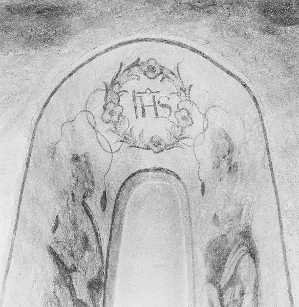 Kalkmålning, långhusets södra vägg, gotisk fönsternisch. Kategori: (03) KalkmålningarKalkmålning, långhusets södra vägg, gotisk fönsternisch.